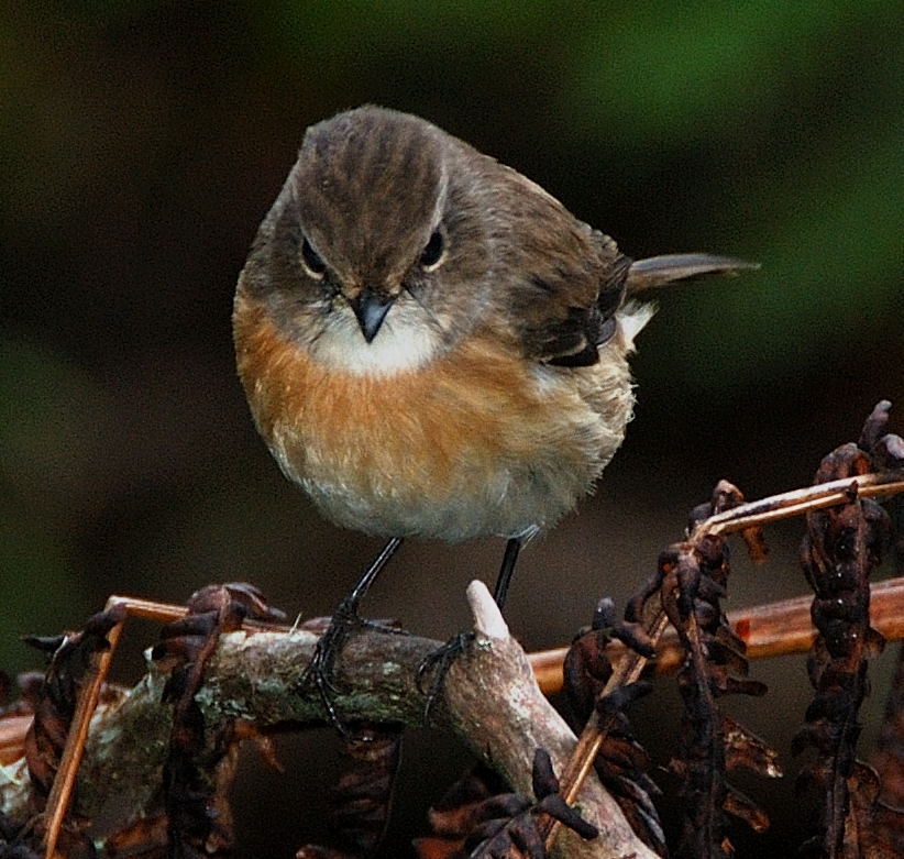 tec tec femelle